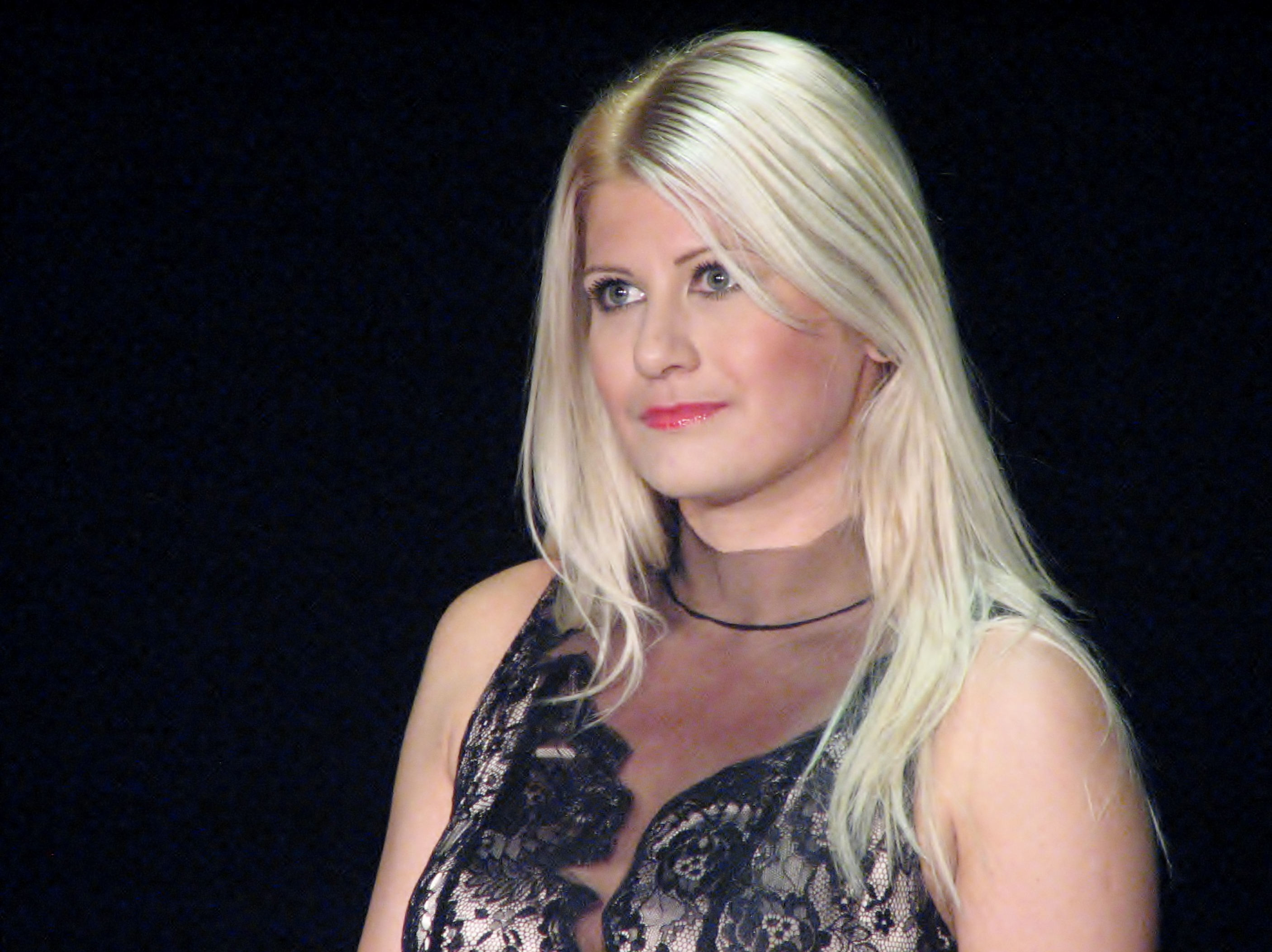 Viktoria Ladõnskaja Rahvusraamatukogu teatrisaali laval festivali III Dovlatovi Päevad Tallinnas raames